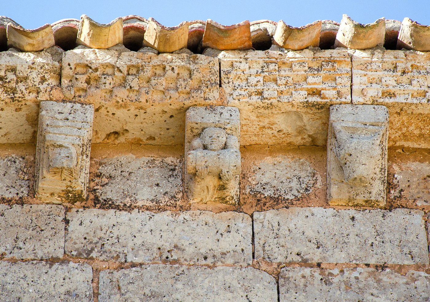 Dolio (instrumento musical). Canecillo en la iglesia de El Salvador de Villalibado. En el centro. Intérprete de dolio. Siglo XII.